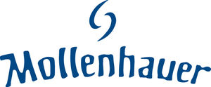 Logo der Conrad Mollenhauer GmbH